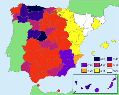 Porcentaje de los nacidos en cada provincia de España con los 10 apellidos más corrientes de la provincia, según INE 2006.